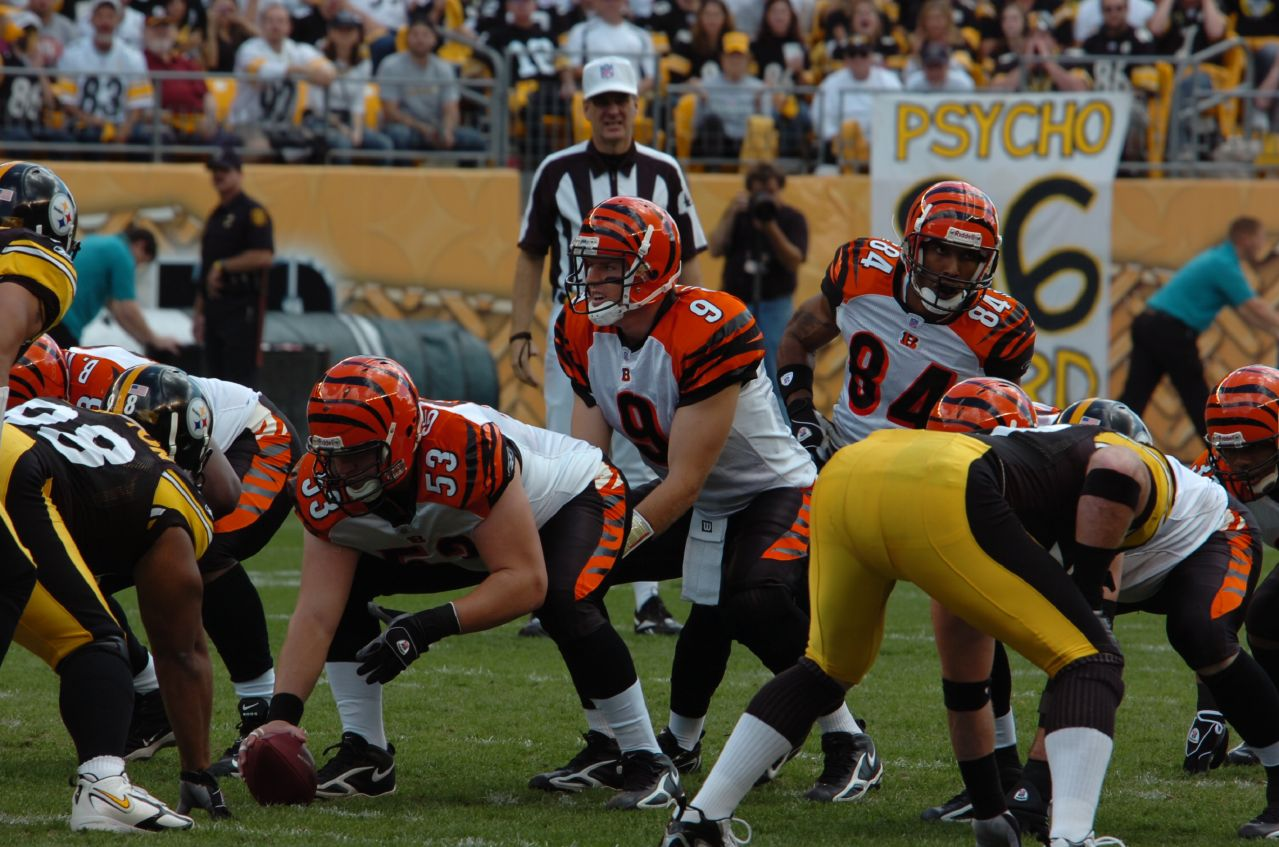 Carson Palmer under center against the Pittsburgh Steelers at Heinz Field